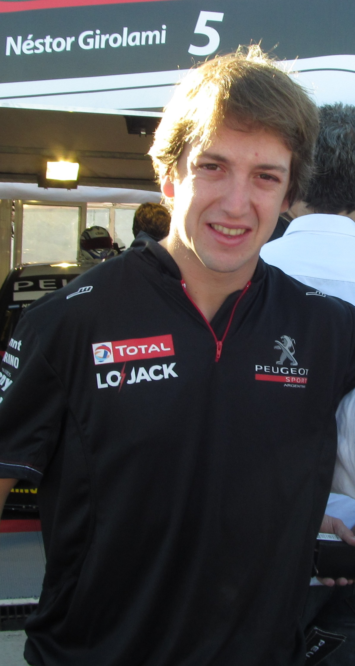 Nestor Girolami